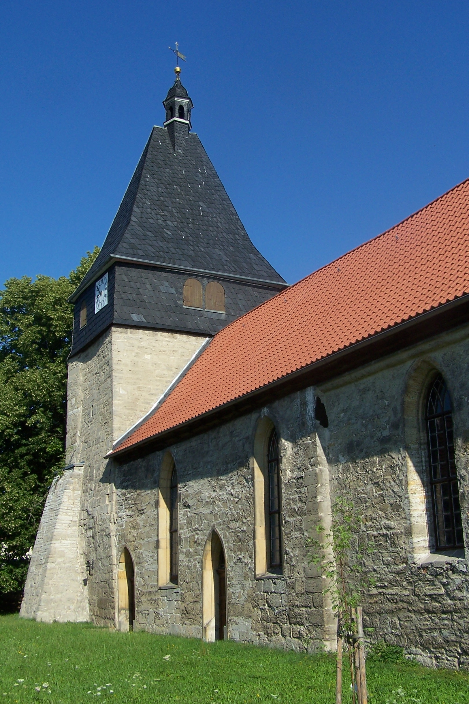 Ansichten und Details zur Kirche